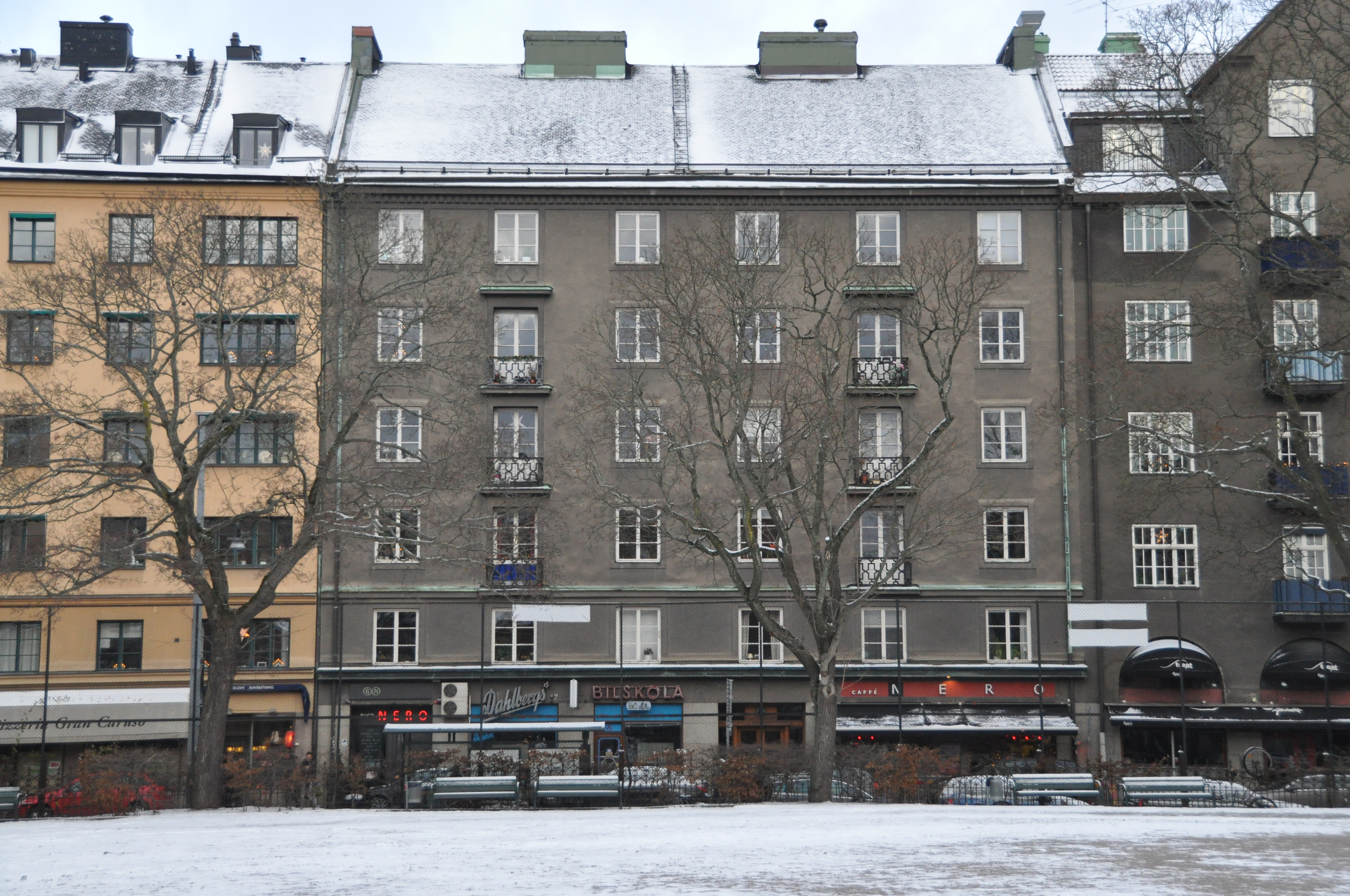 Muraren 12, Roslagsgatan 4, Stockholm. Byggnadsår 1929-31, arkitekt Harald Mores, byggherre och byggmästare B K Jernberg